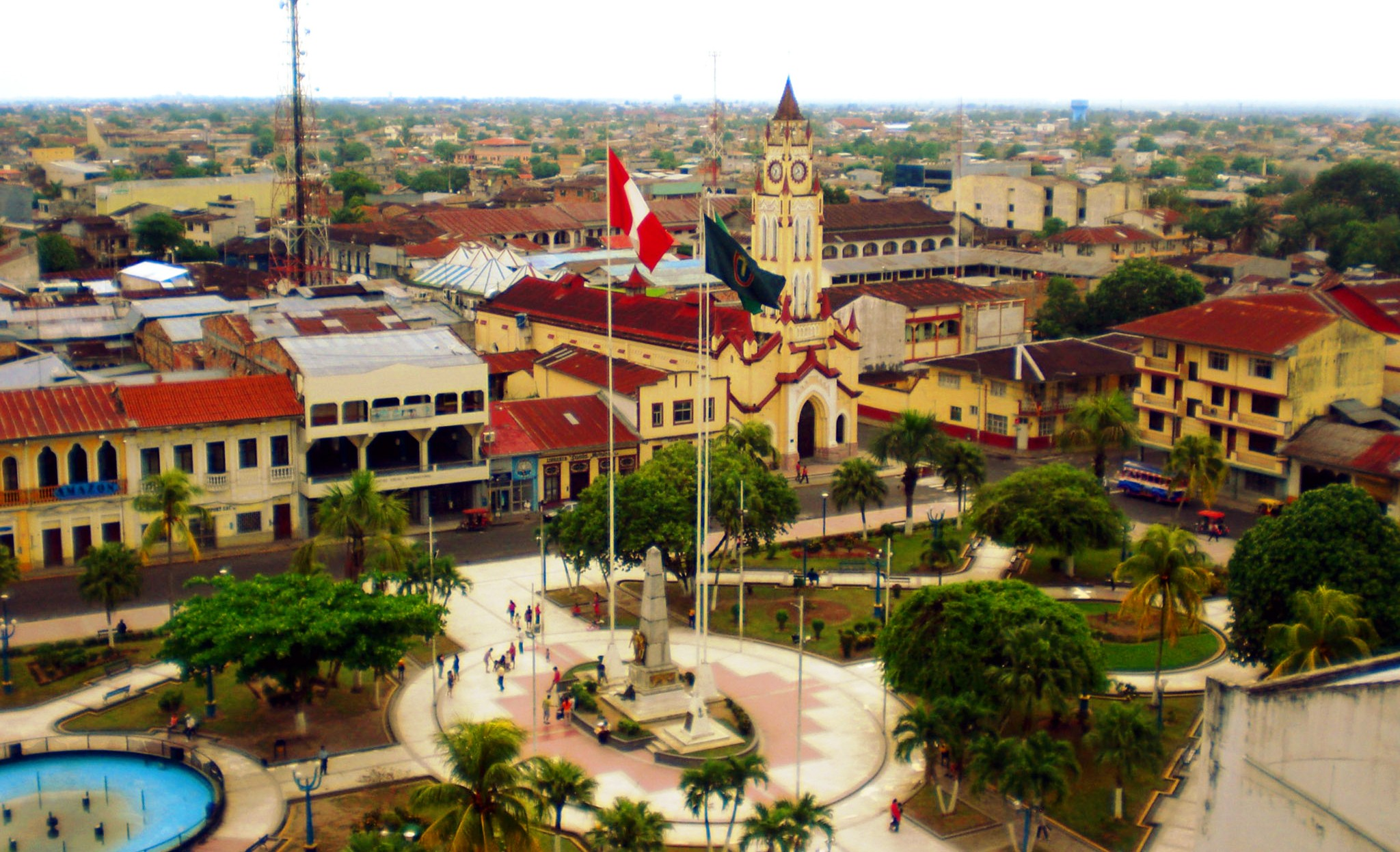 Vista amplia de la Plaza de Armas de Iquitos.